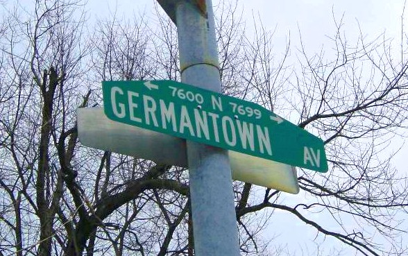 Bildbeschreibung: Straßenschild Germantown Avenue, Philadelphia (USA) Quelle: selbst fotografiert Fotograf/Zeichner: DER UNFASSBARE